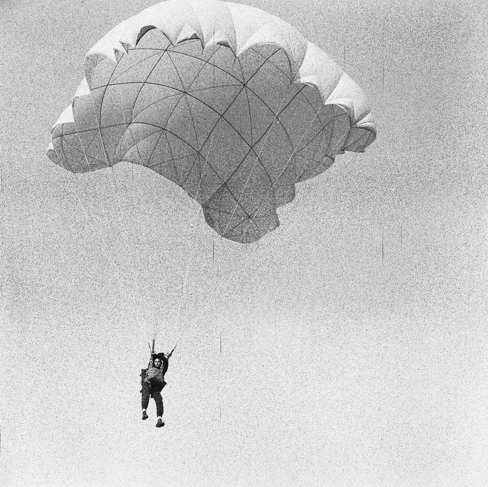 Original image description from the Deutsche Fotothek Fallschirmspringerin der GST mit PD-47